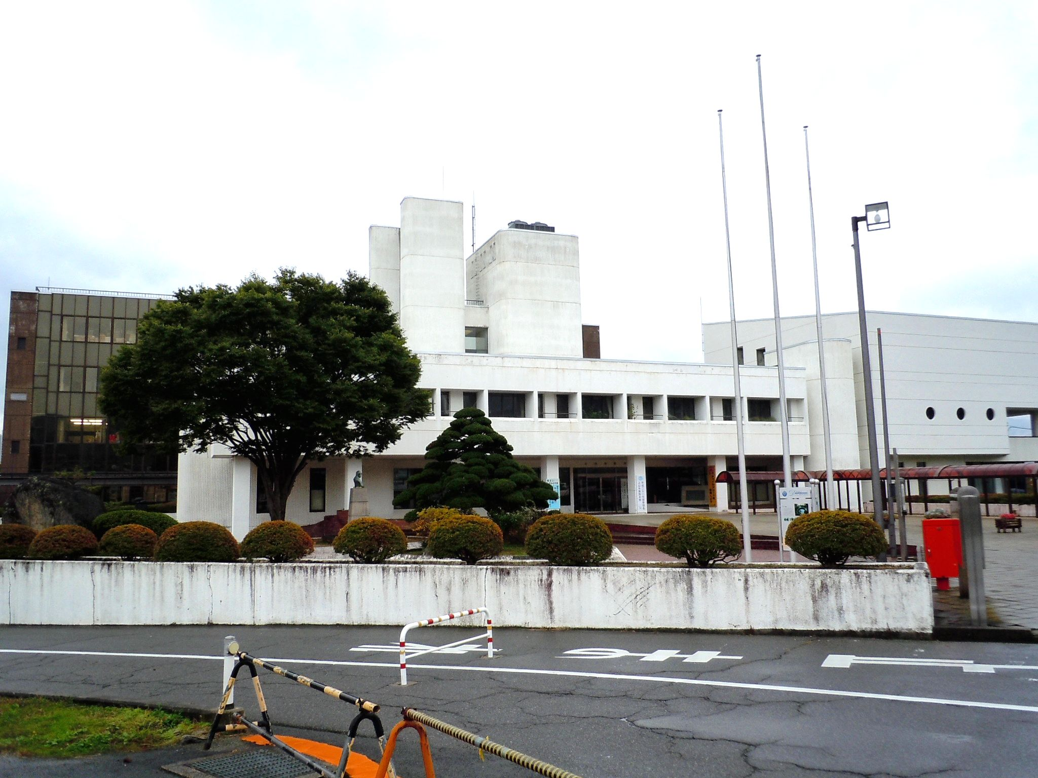 上山市役所